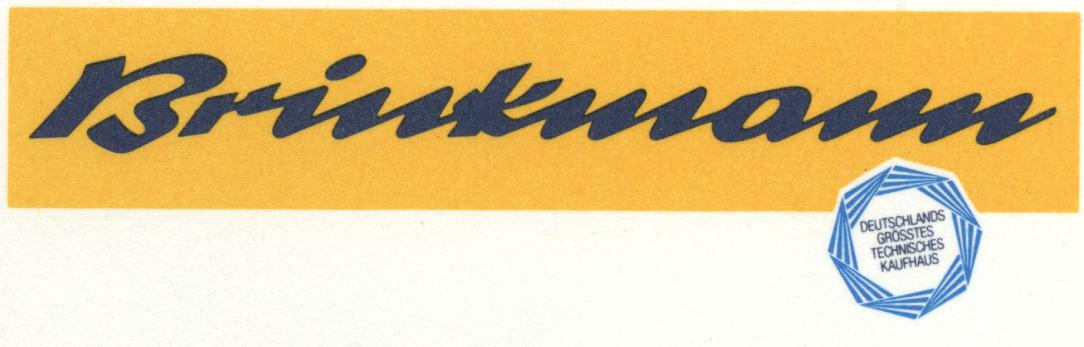 Offizielles Firmen-Logo 1992